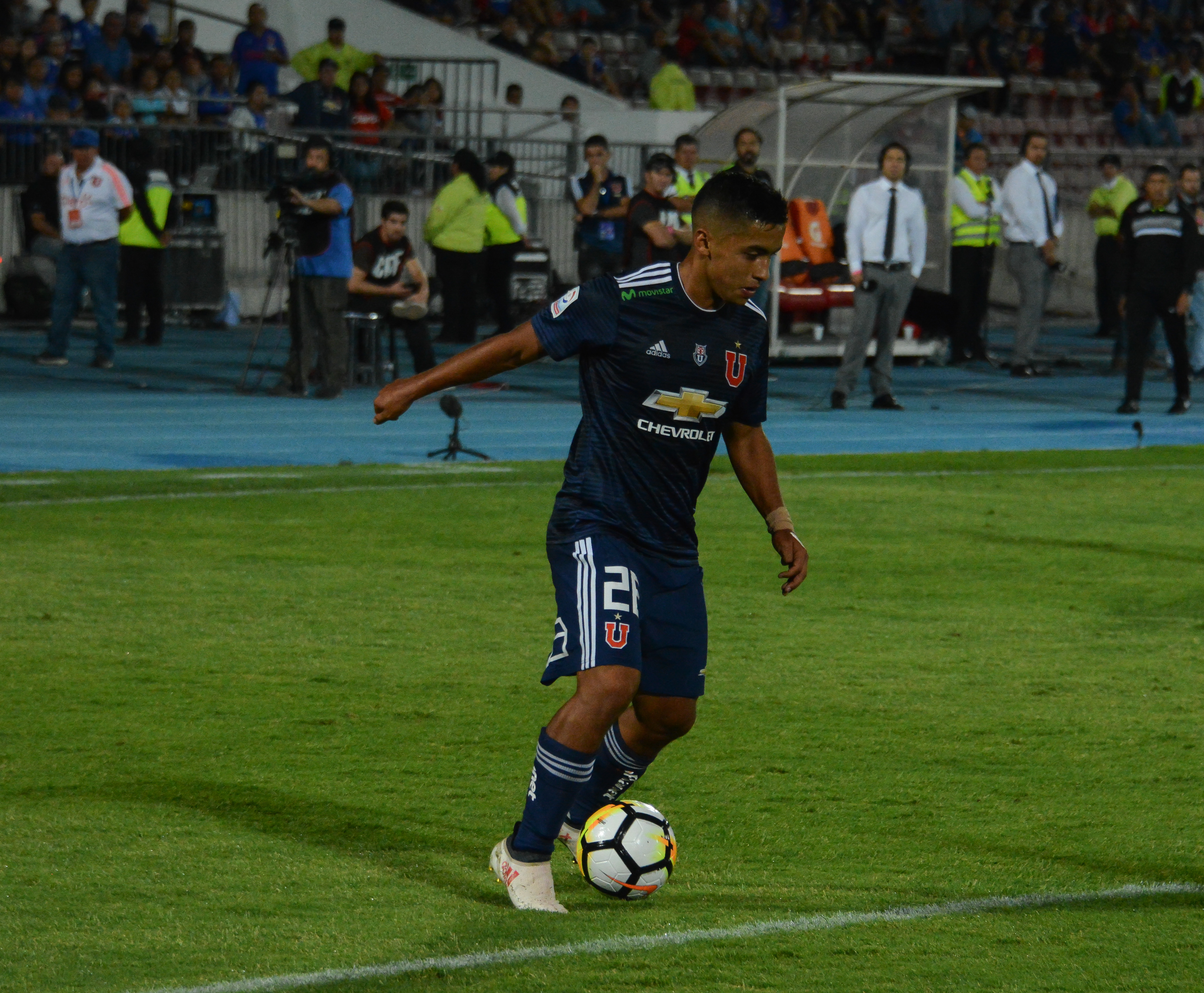 Nicolás Guerra, Universidad de Chile v Deportes Antofagasta, Estadio Nacional, Santiago, Chile.